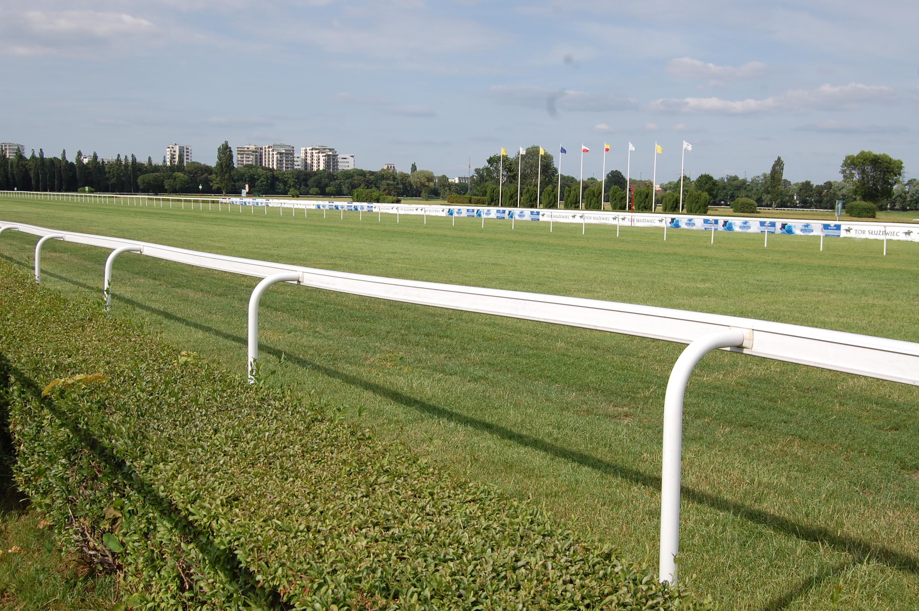 Ursynów Północny, Warszawa, Poland